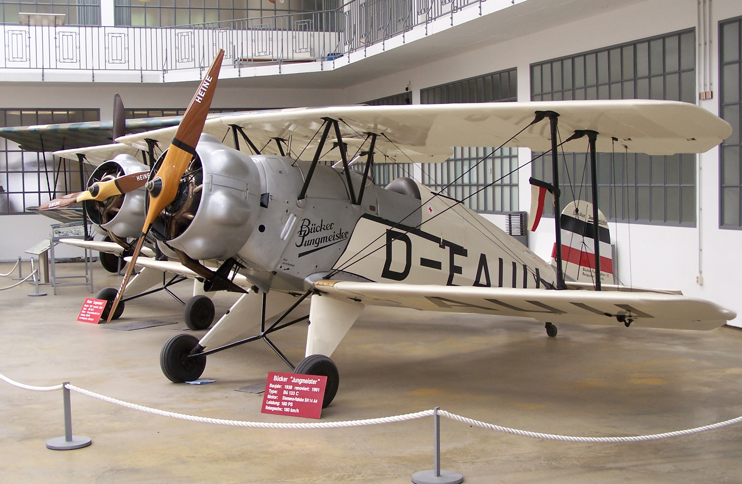 Das Foto zeigt eine Bücker Bü 133 Jungmeister in der Flugwerft Schleißheim, eine Außenstelle des Deutschen Museums.